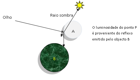 Template:Trajecto dos raios sombra